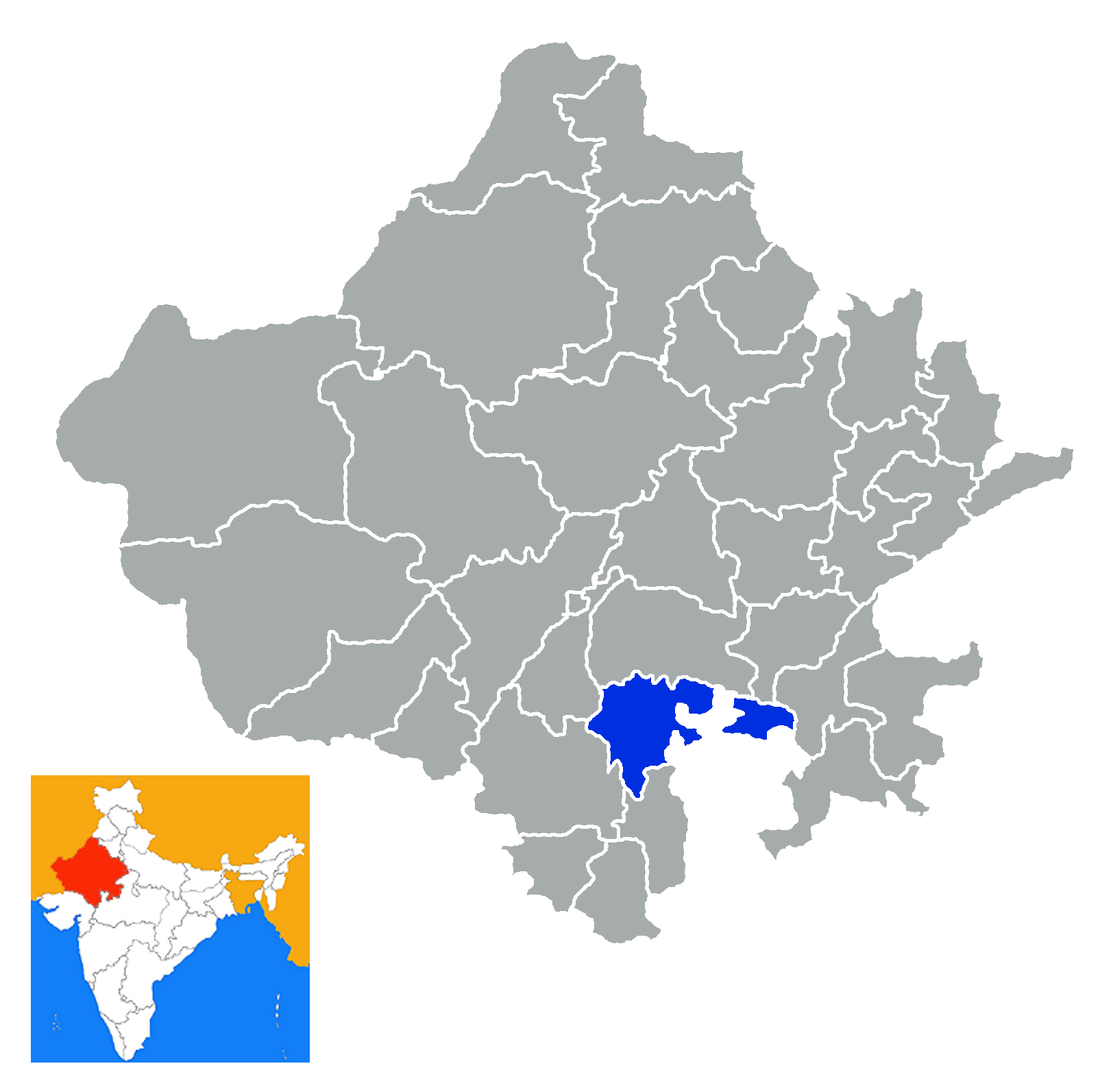 Distrito de Chittaurgarh Rajastan India